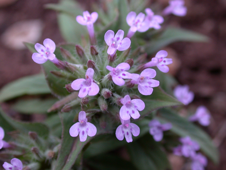 Ziziphora capitata L. (אבובית מקורקפת), Mount Carmel, Israel, April 11, 2006.